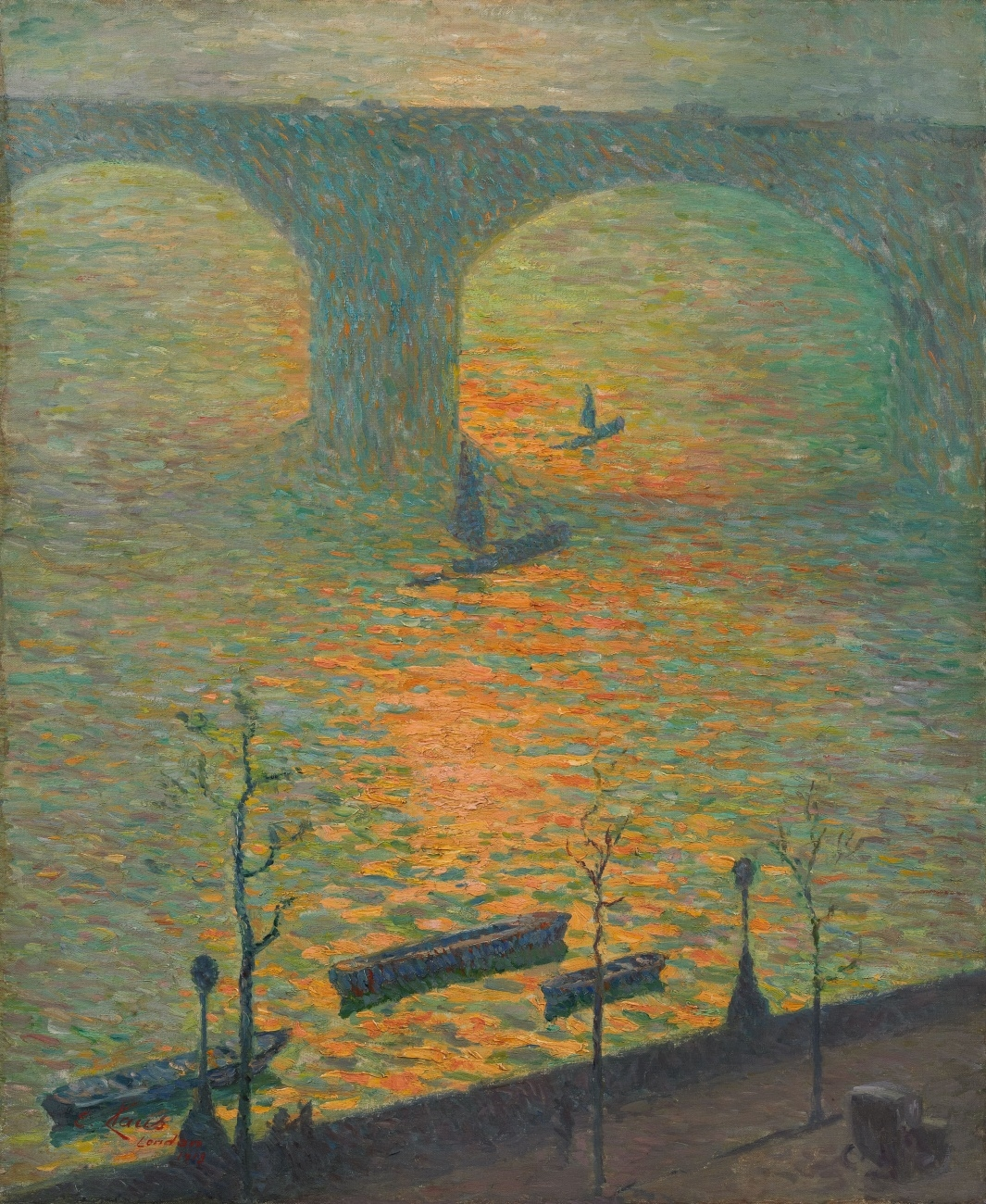 London (Waterloo Bridge), 1918. Öl auf Leinwand 61 x 50,2 cm